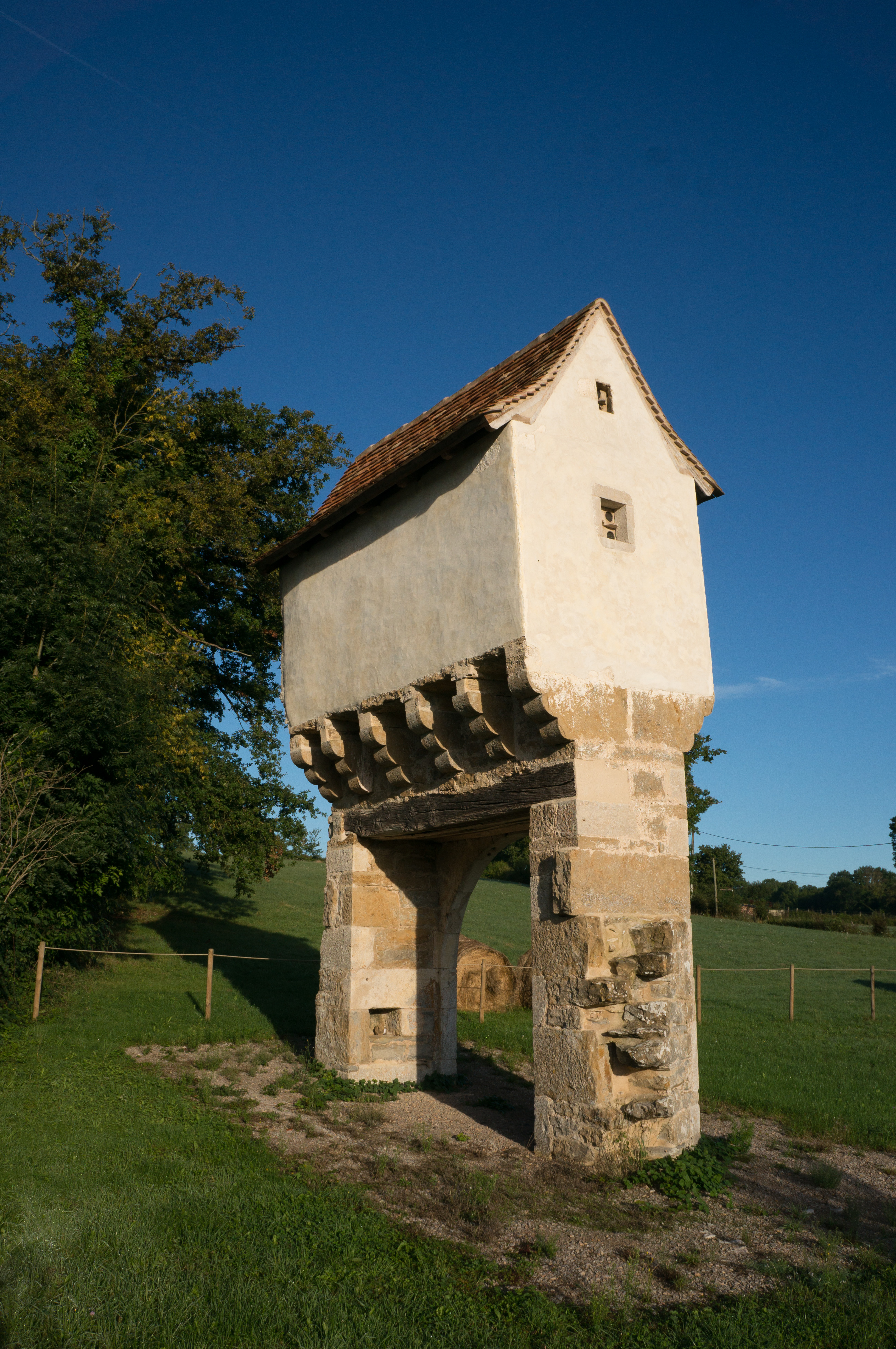 Pigeonnier-porche de Lavergne